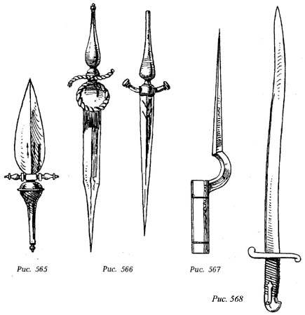 Багинет, с латунной оправой и деревянной ручкой-пробкой. Кон. XVII в.; багинеты. Англия. XVII в.; французский втулочный штык, 1724 г.; французский штык системы Дельвиня, образца 1840 г. (т. н. «ятаган»).